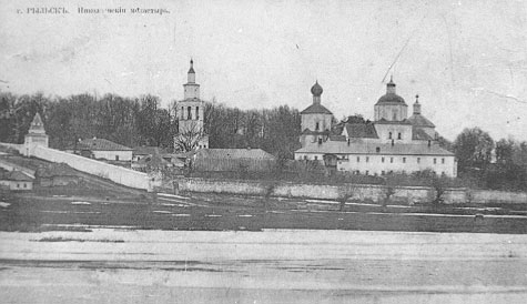 Николаевский монастырь под Рыльском